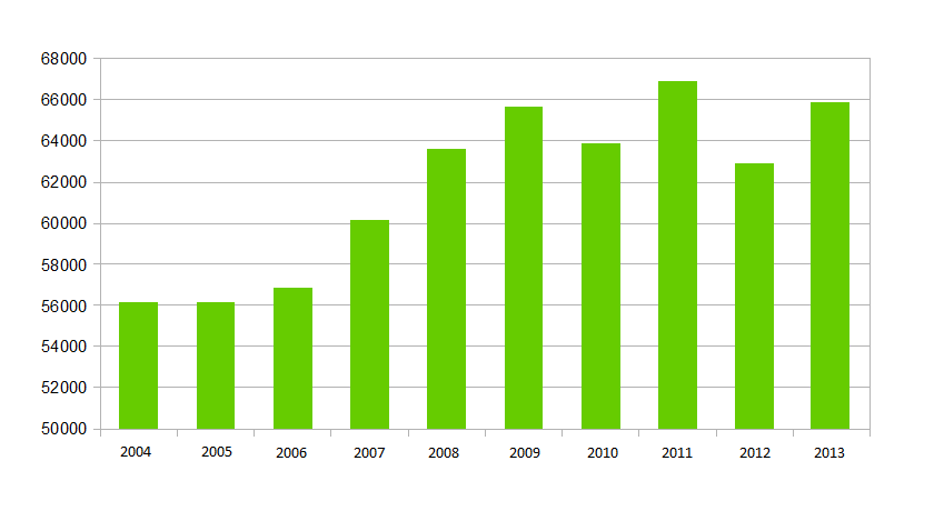 Veikiančių mažų ir vidutinių įmonių skaičius